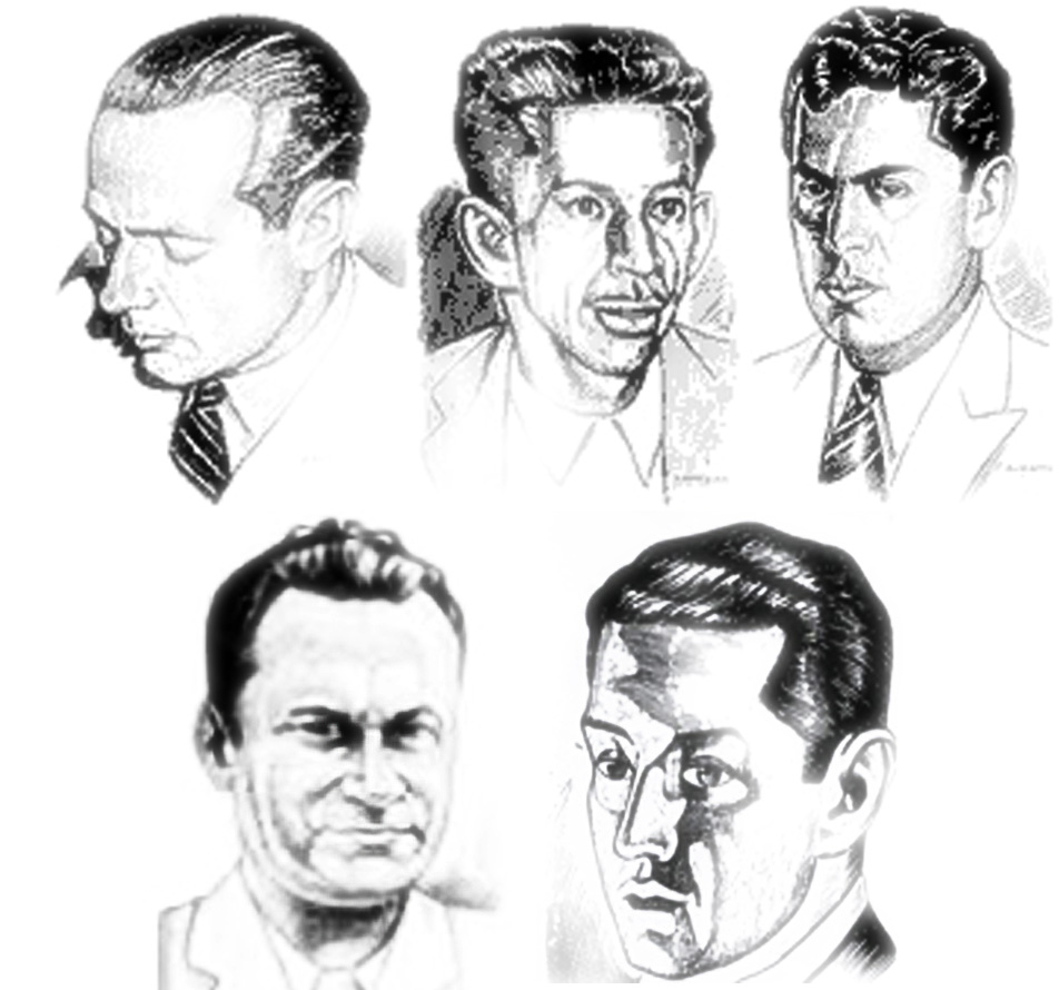 Imagen acerca de los integrantes del grupo de Guayaquil